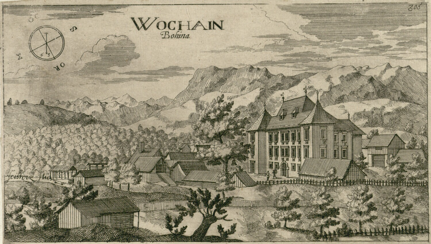 Dvorec Bohinj